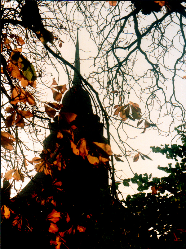 Le clocher de l'église de Pas-en-Artois